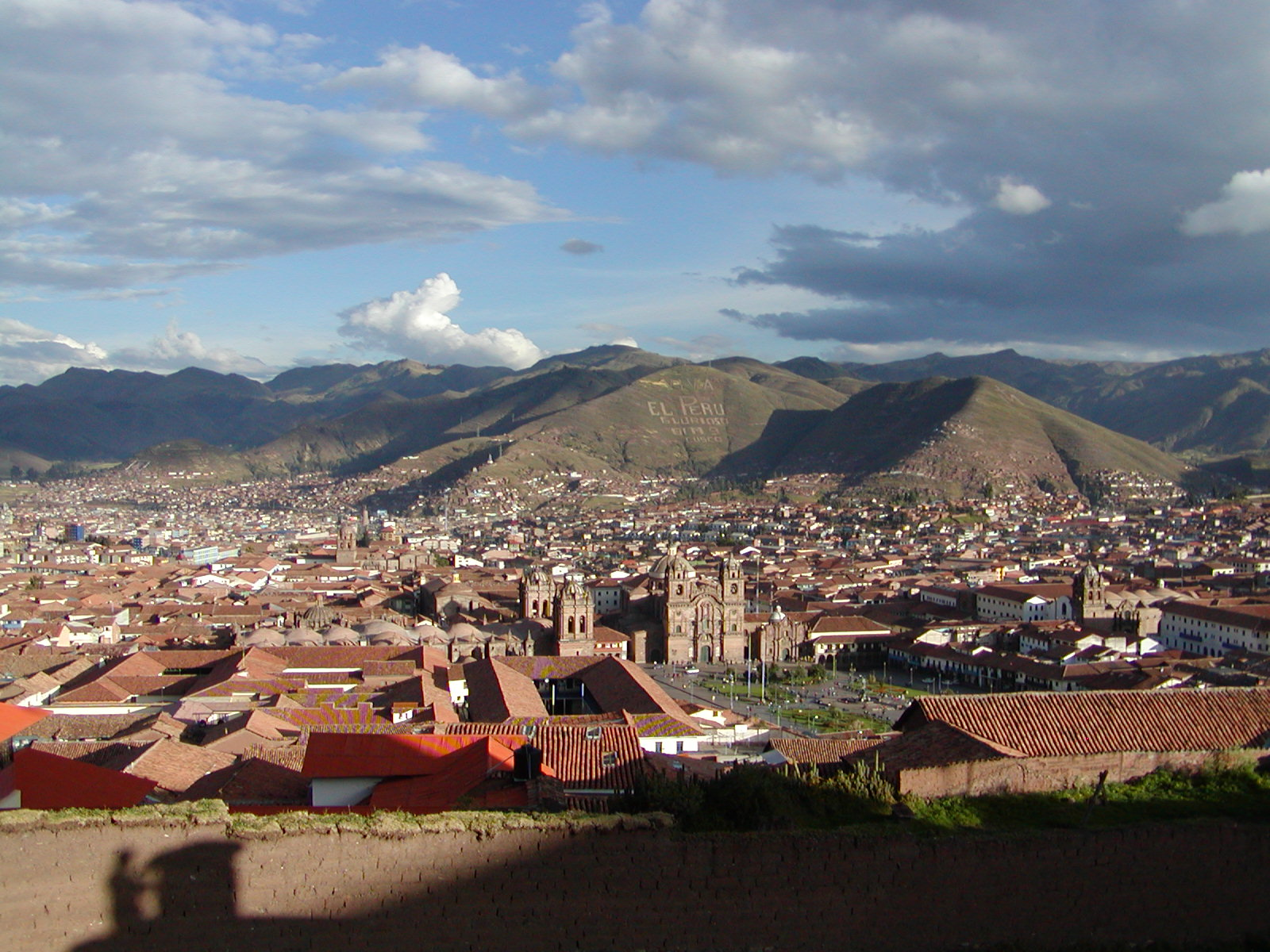 Peru - Cuzco - Plaza de Armas - 21.04.2005